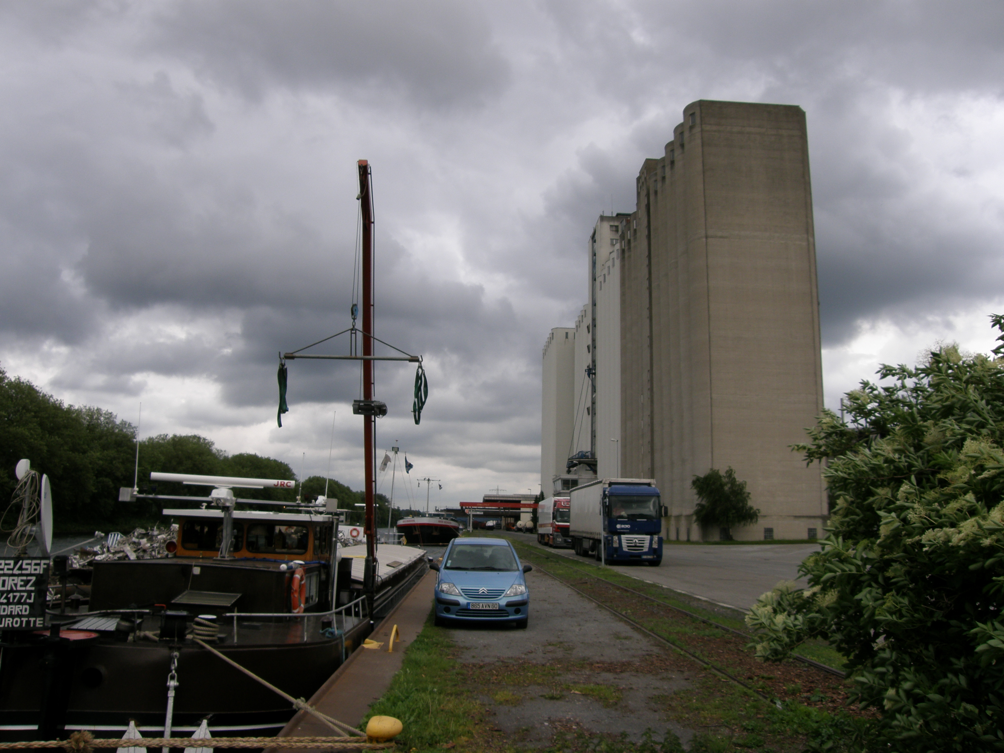 Rhein-Ruhr-Hafen in Mülheim an der Ruhr, Am Nordhafen - Ecke Rheinstraße - links der Ruhrkanal mit festgemachten Schiffen, rechts der Zuckersilo